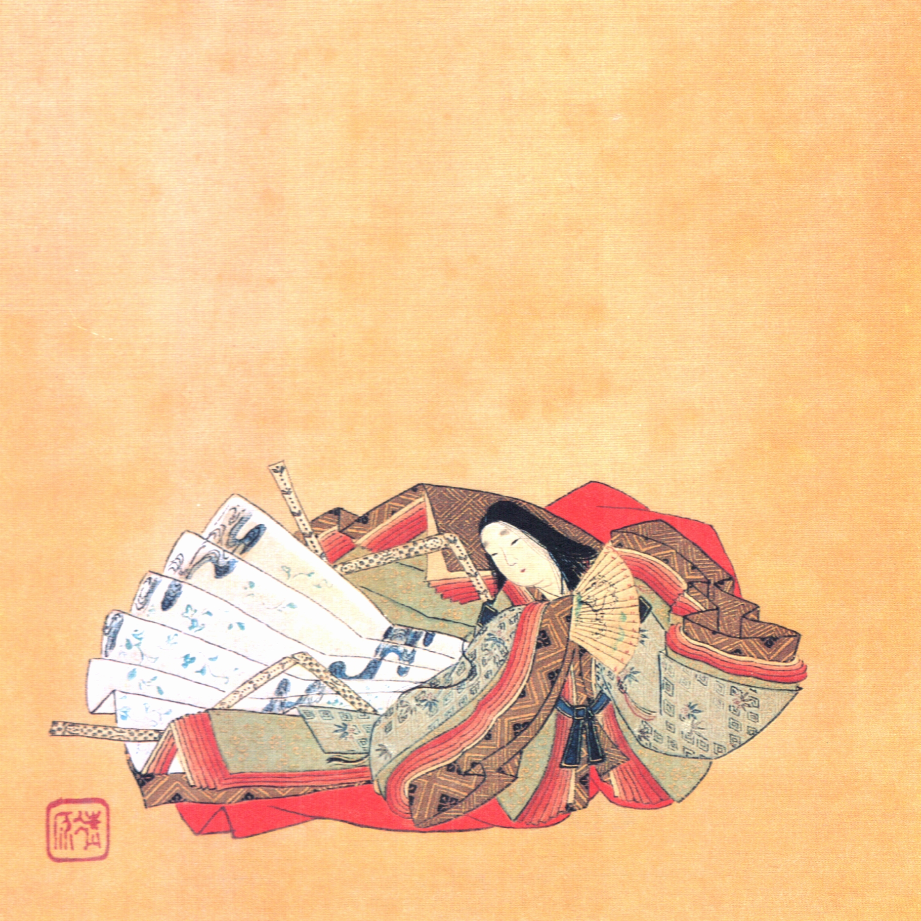 女房三十六人歌合 後鳥羽院宮内卿